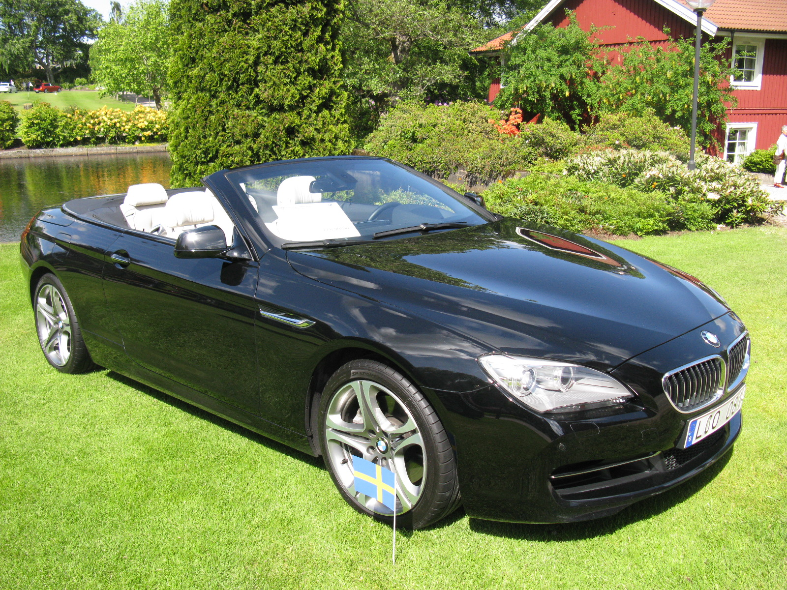 BMW 640i Cabriolet F13